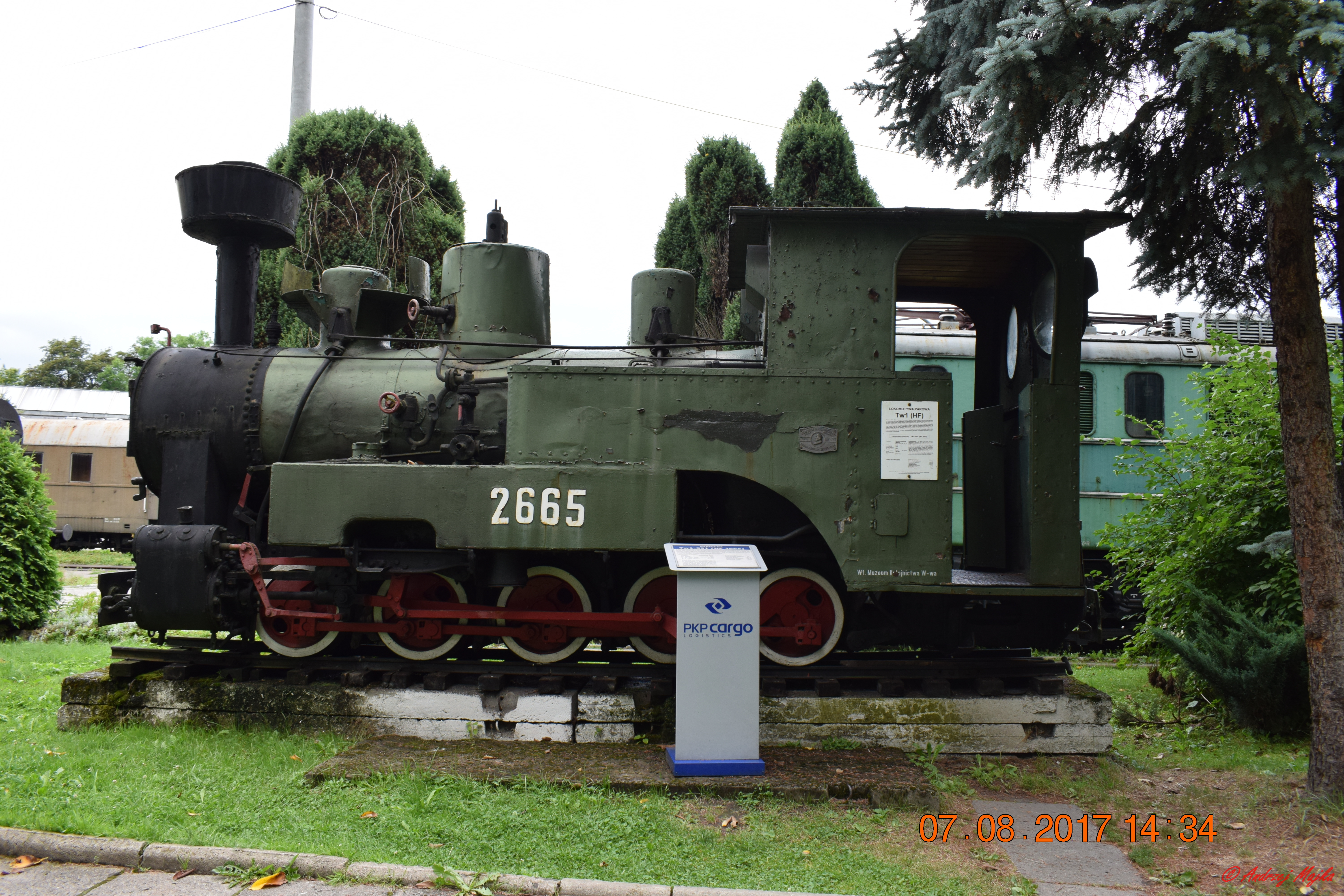 Jedyny zachowany parowów na świecie